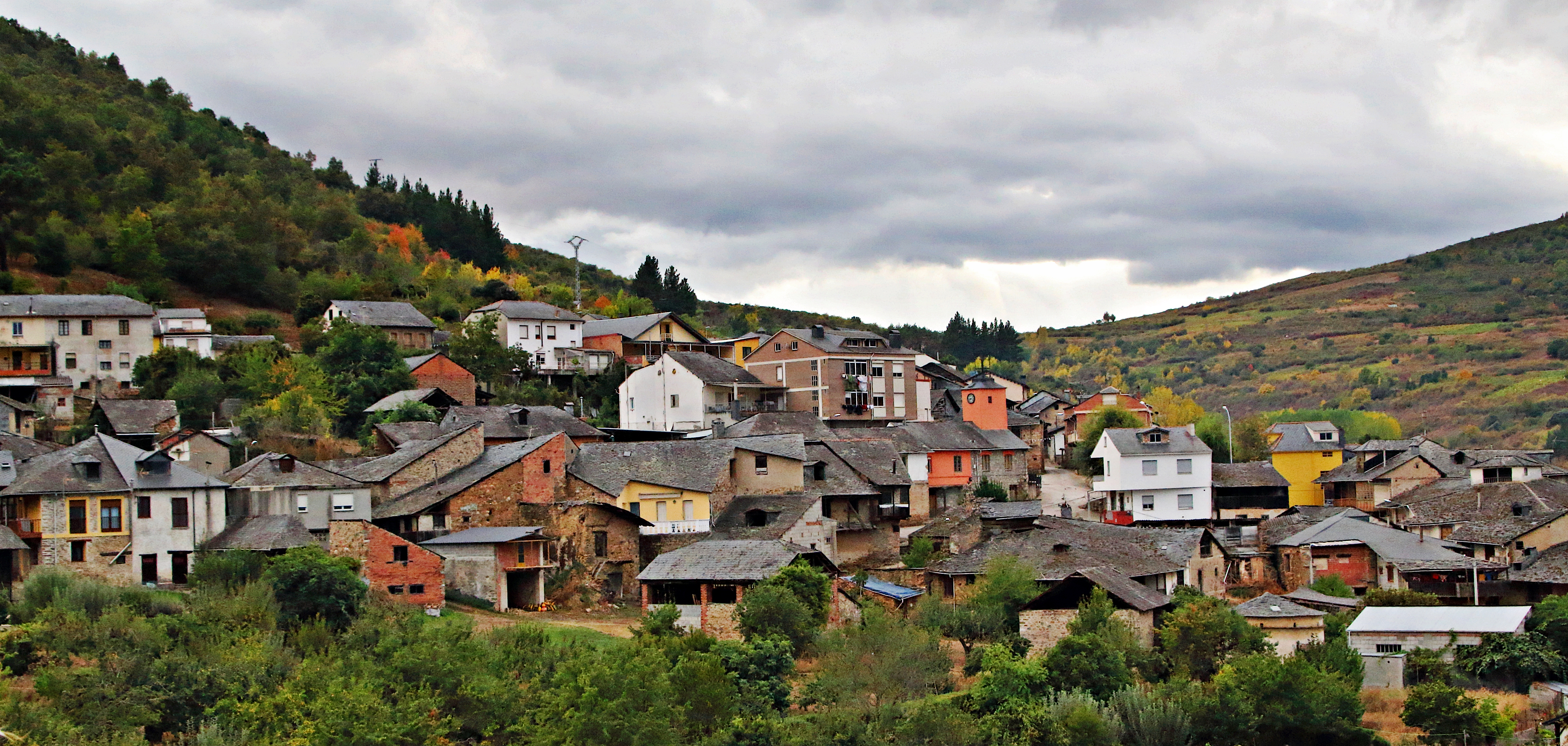 Santalla del Bierzo, localidad de Priaranza del Bierzo, comarca de El Bierzo, provincia de León.